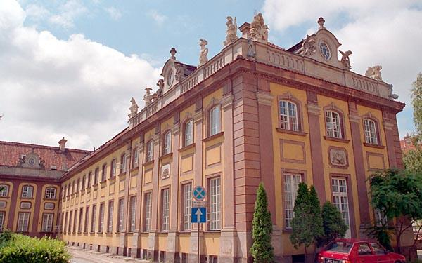 Branicki Palac in Warsaw